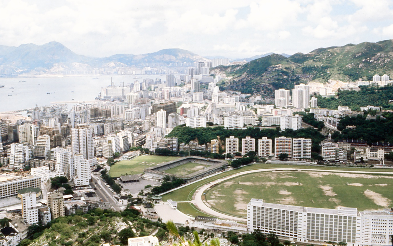 Hong Kong Island Causeway Bay and Happy Valley